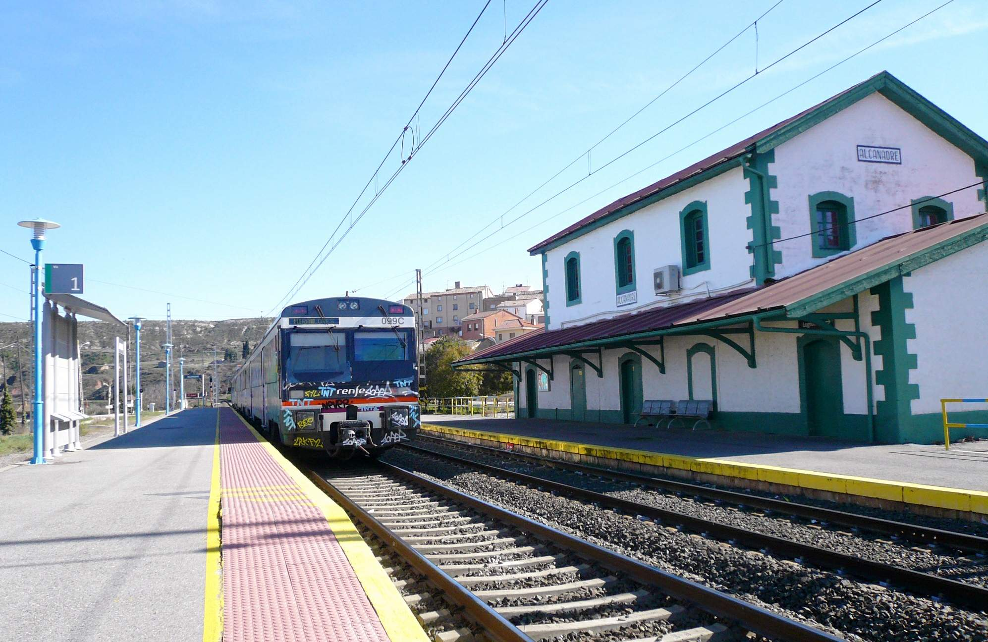 Estación de Alcanadre (La Rioja)